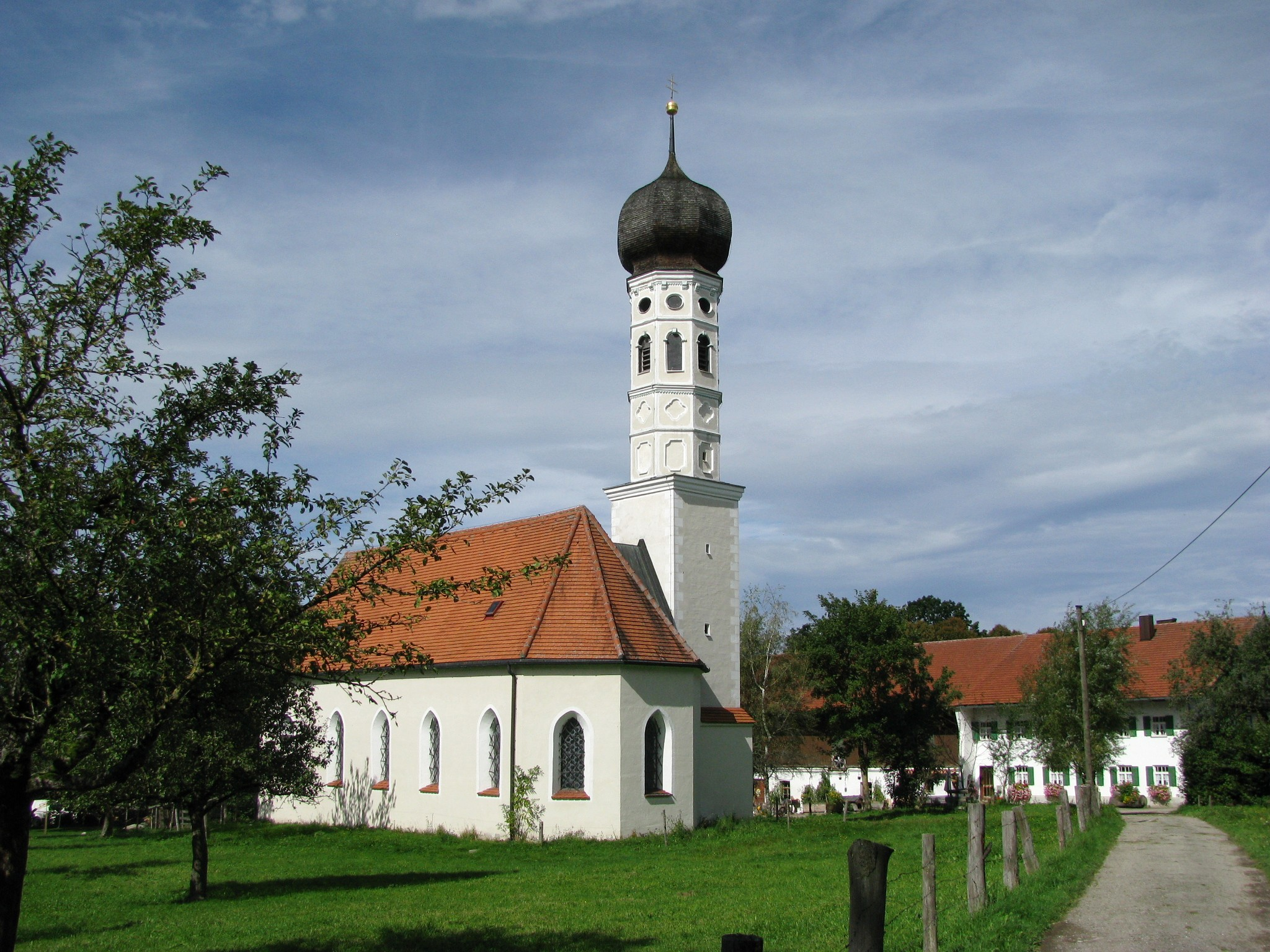 Jasberg in der Gemeinde Dietramszell, Kirche St. Quirin und St. Katherina